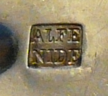 Poinçon sur couvert argenterie "orfèvrerie gallia" (christofle)